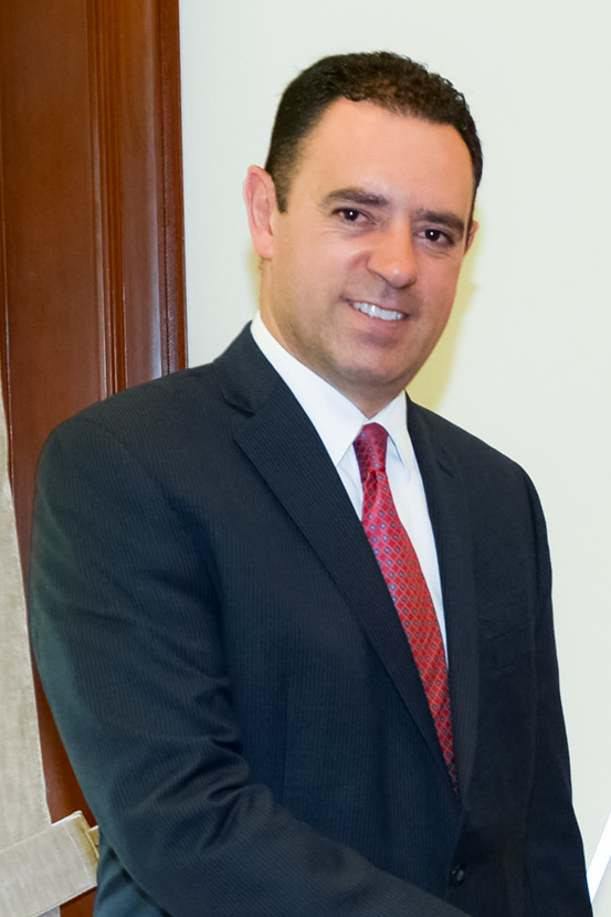 Alejandro Tello Cristerna Gobernador del Estado de Zacatecas por el periodo 2016 – 2021